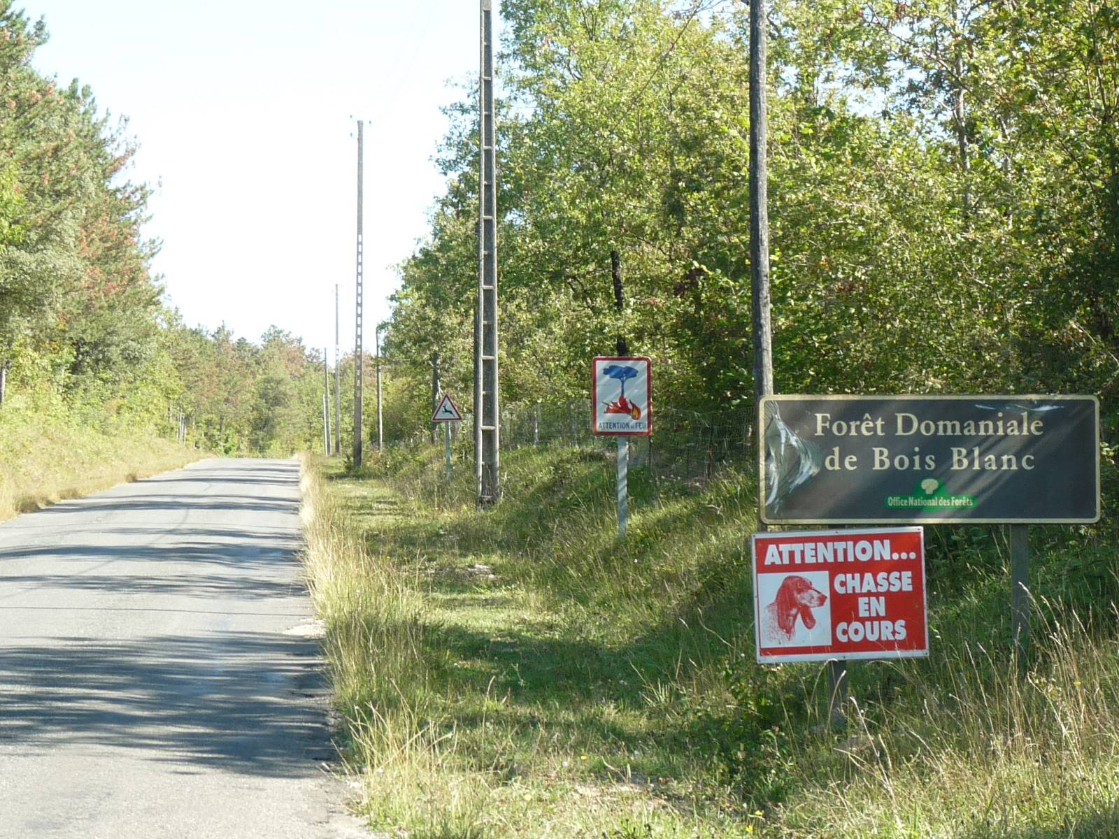 Forêt domaniale de Bois Blanc, Touvre (16), France